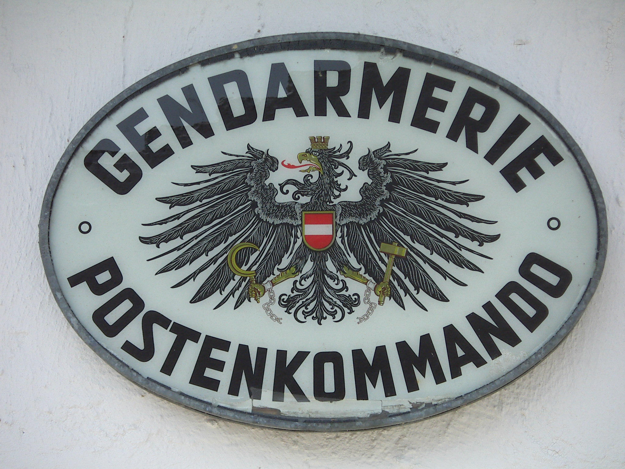 Historischer Leuchthinweis eines Gendarmerie-Postens, Österreich, Dorfmuseum Mönchhof